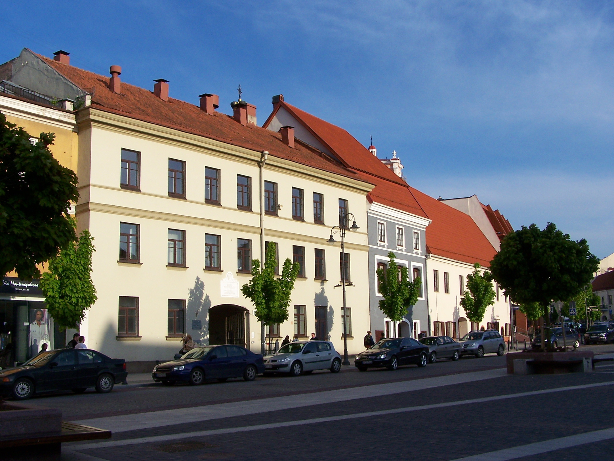 Kamienice przy ul. Didžioji w Wilnie (Litwa).